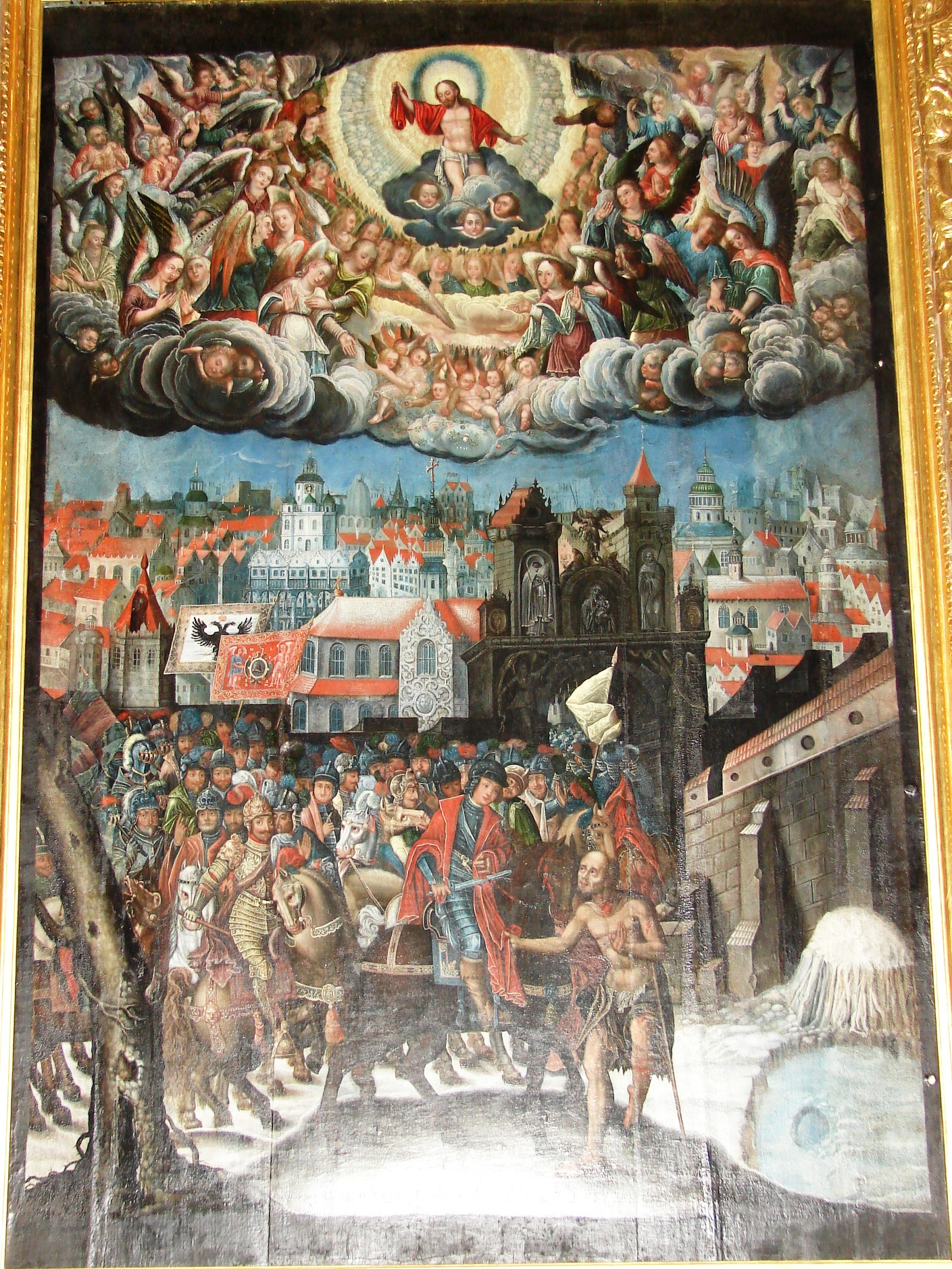 Krzysztof Boguszewski Wjazd św. Marcina do Amiens, Poznań Archcathedral Basilica